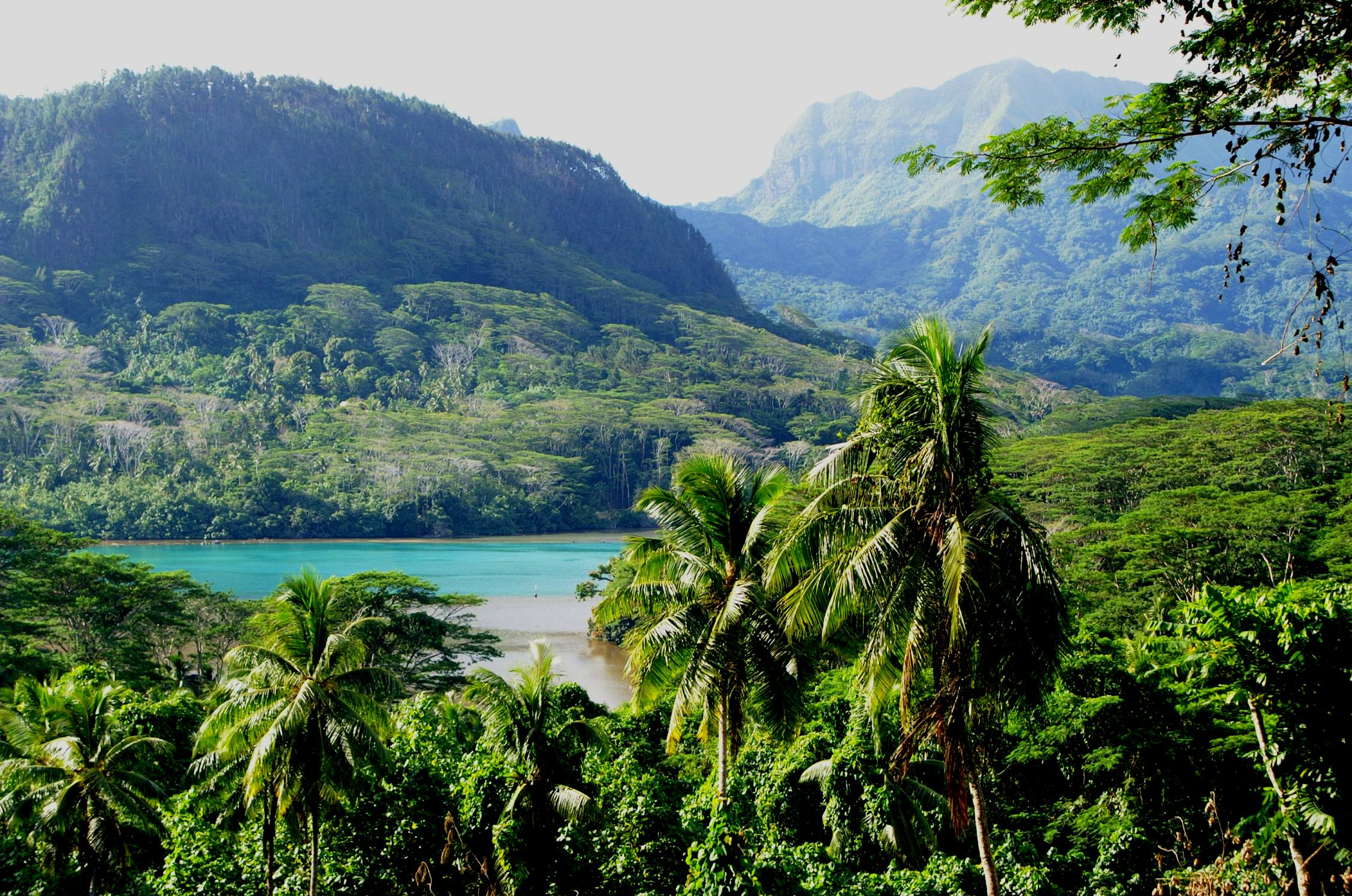 PICT0079/French Polynésia/ Huahiné Iti Island/ Haapu Bay